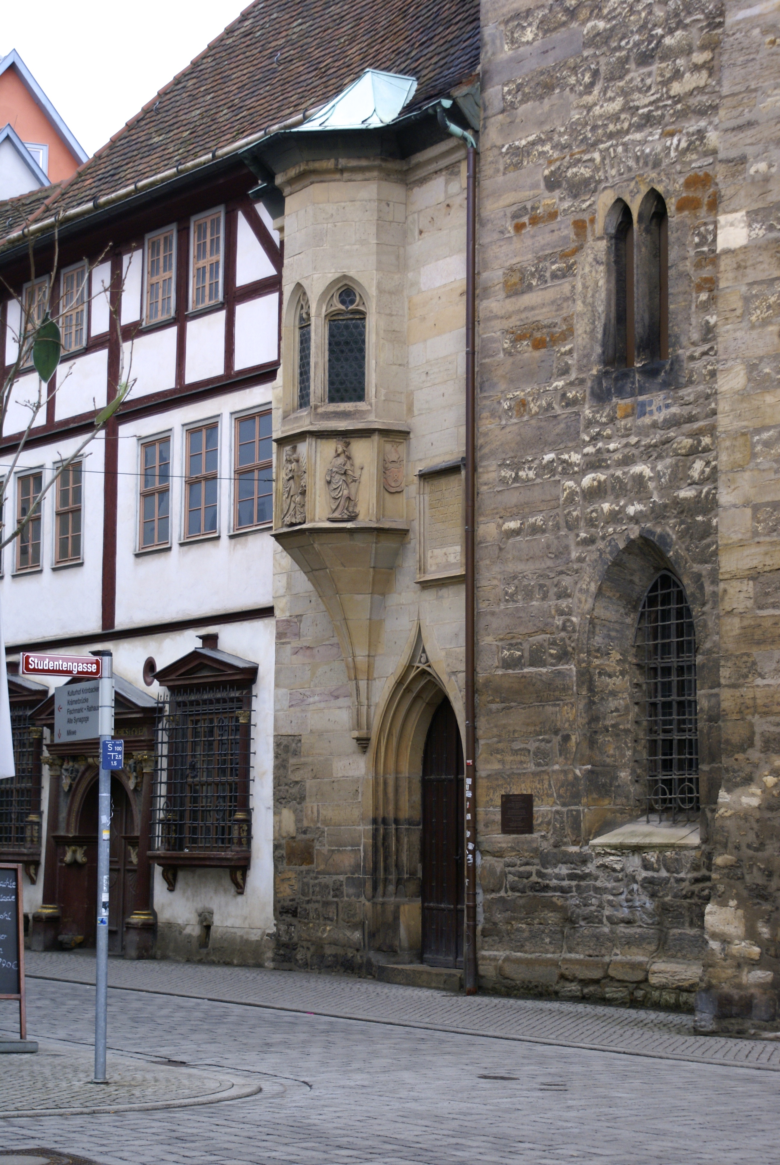 Die Dreifaltigkeitskapelle oder auch Laasphe Kapelle in der Michaelisstraße - Erfurt, Thüringen, Deutschland.